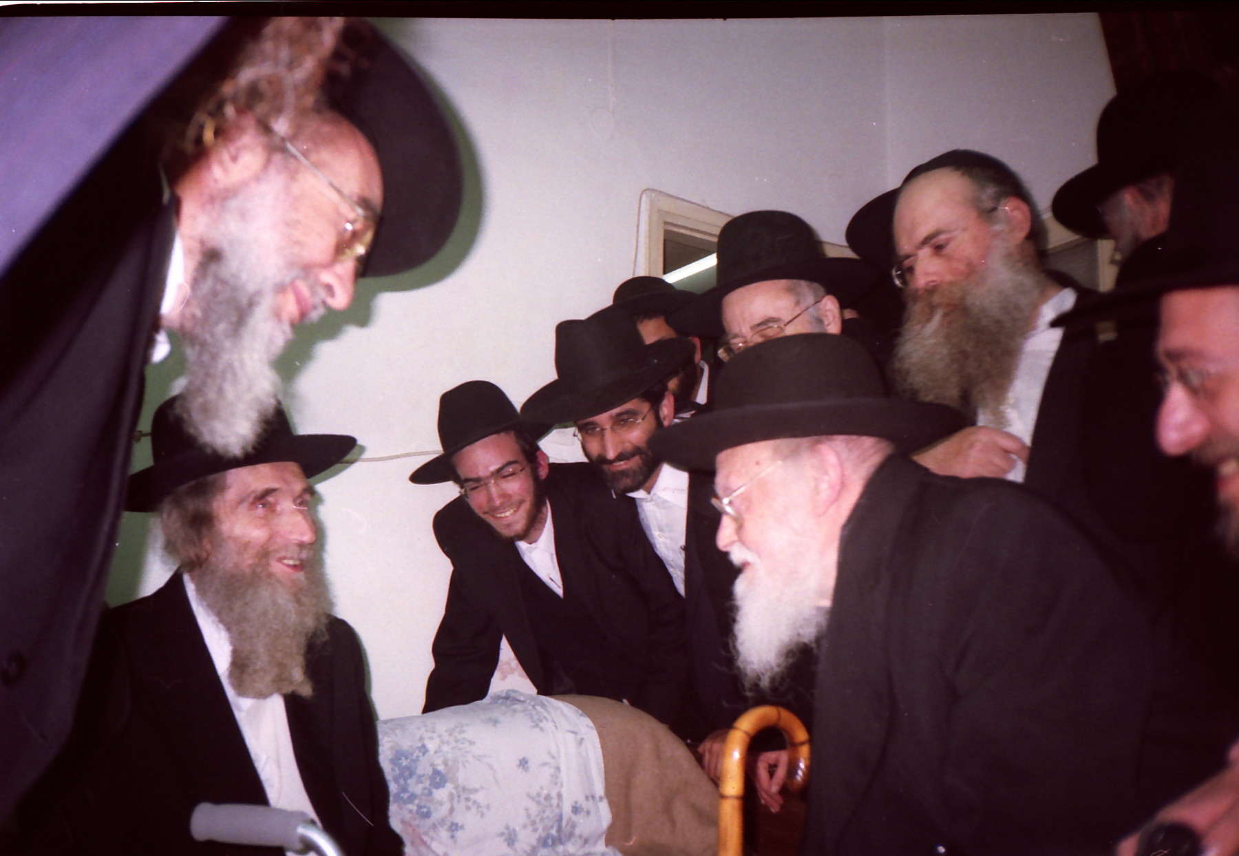 רב יוסף שלום אלישיב בביקור נדיר אצל הרב אהרון יהודה לייב שטיינמן